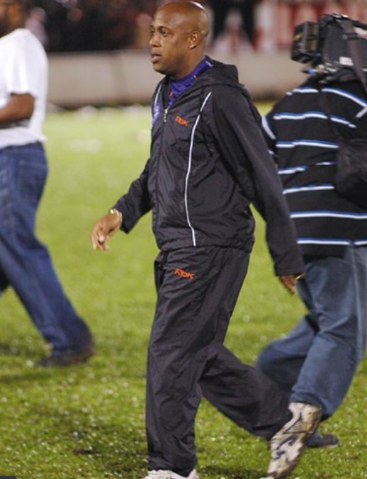 18-10-2006. Hernán Medford como entrenador de Saprissa en el clásico frente a Alajuelense en el Estadio Alejandro Morera Soto.